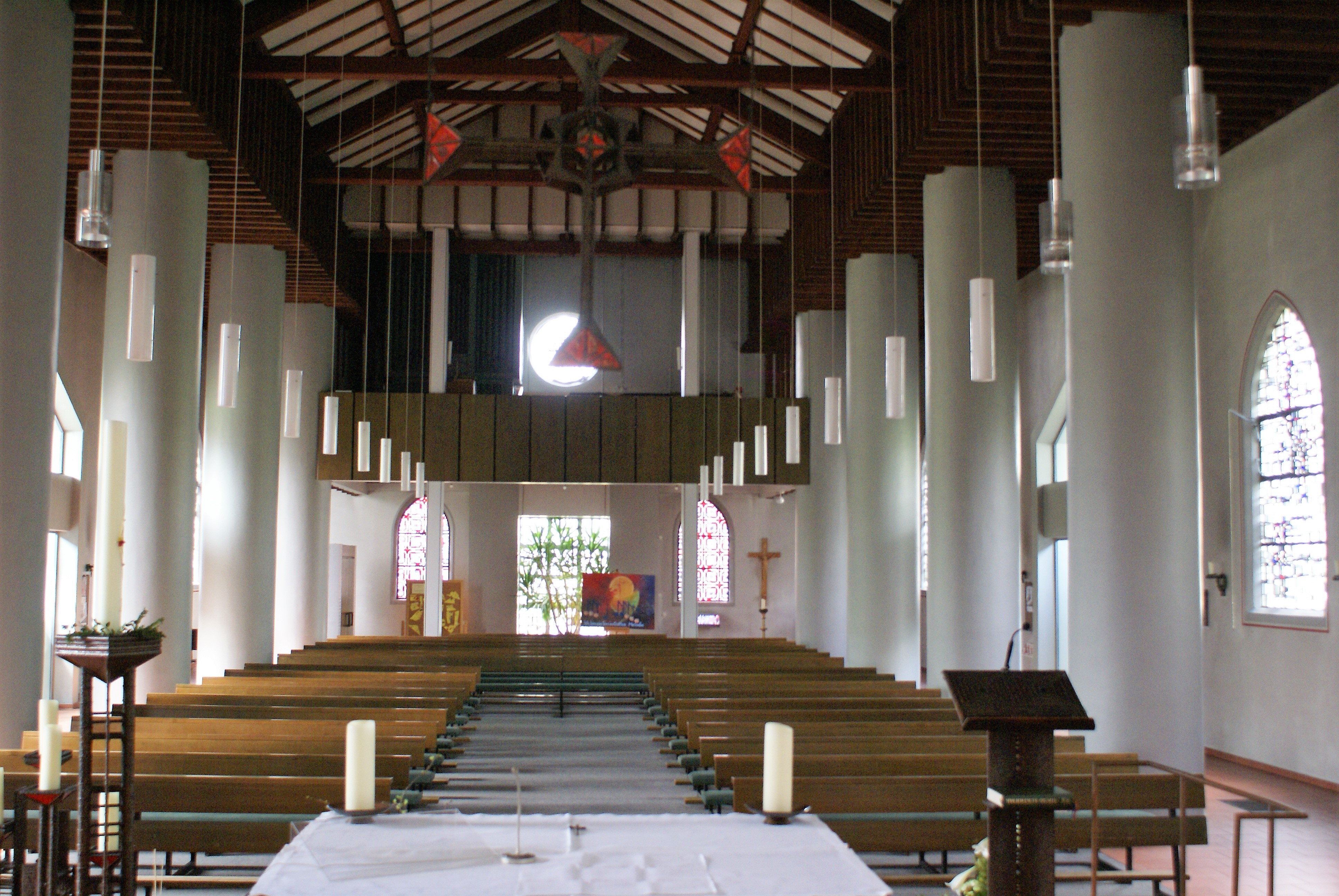 St. Marien in Dorsten-Hervest, Landkreis Recklinghausen, Nordrhein-Westfalen, Deutschland